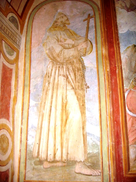 Pezzolo Valle Uzzone. Gorrino. Cappella campestre di San Sebastiano, XVII secolo. Affreschi. Parete di fondo. San Francesco d'Assisi.